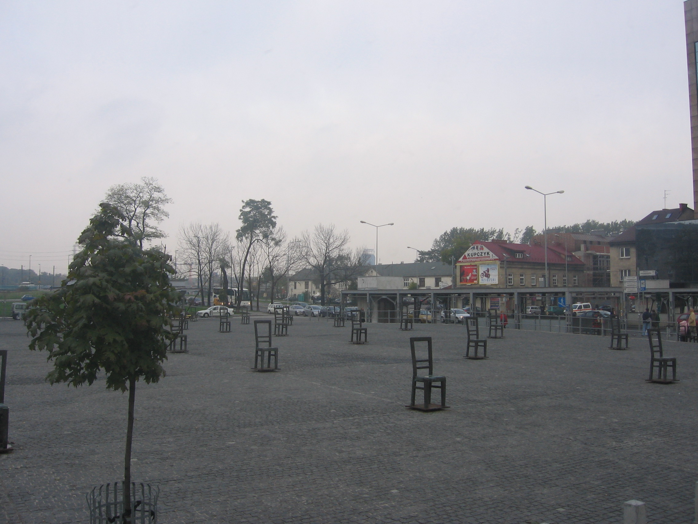 כיכר גטו קרקוב, כיום